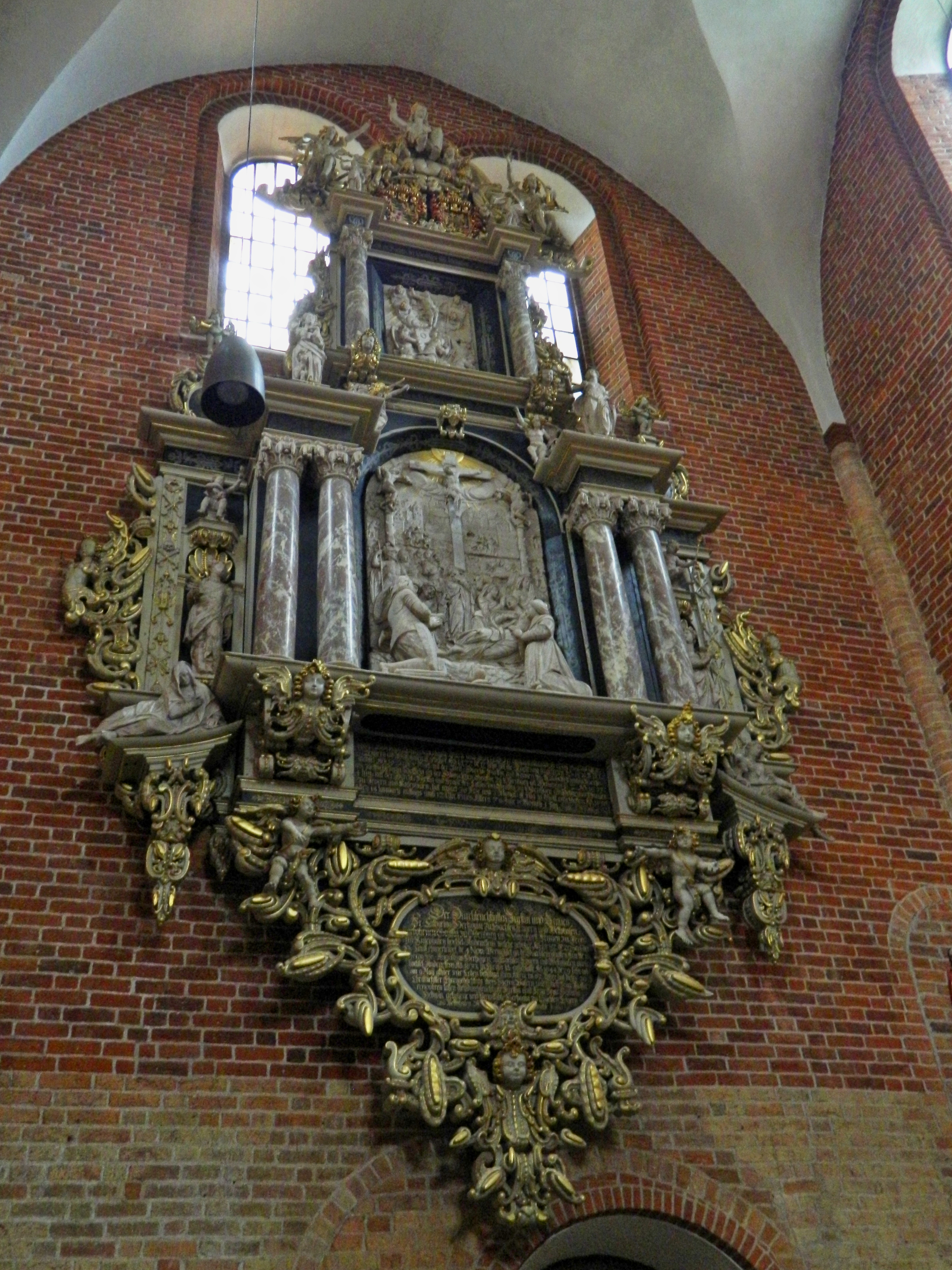 23909 Ratzeburg, Germany